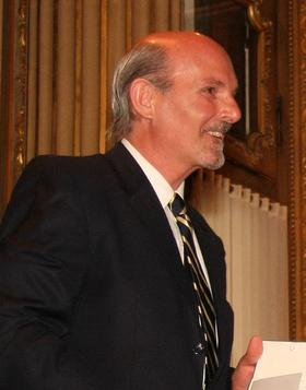 Jorge Valerga Araóz